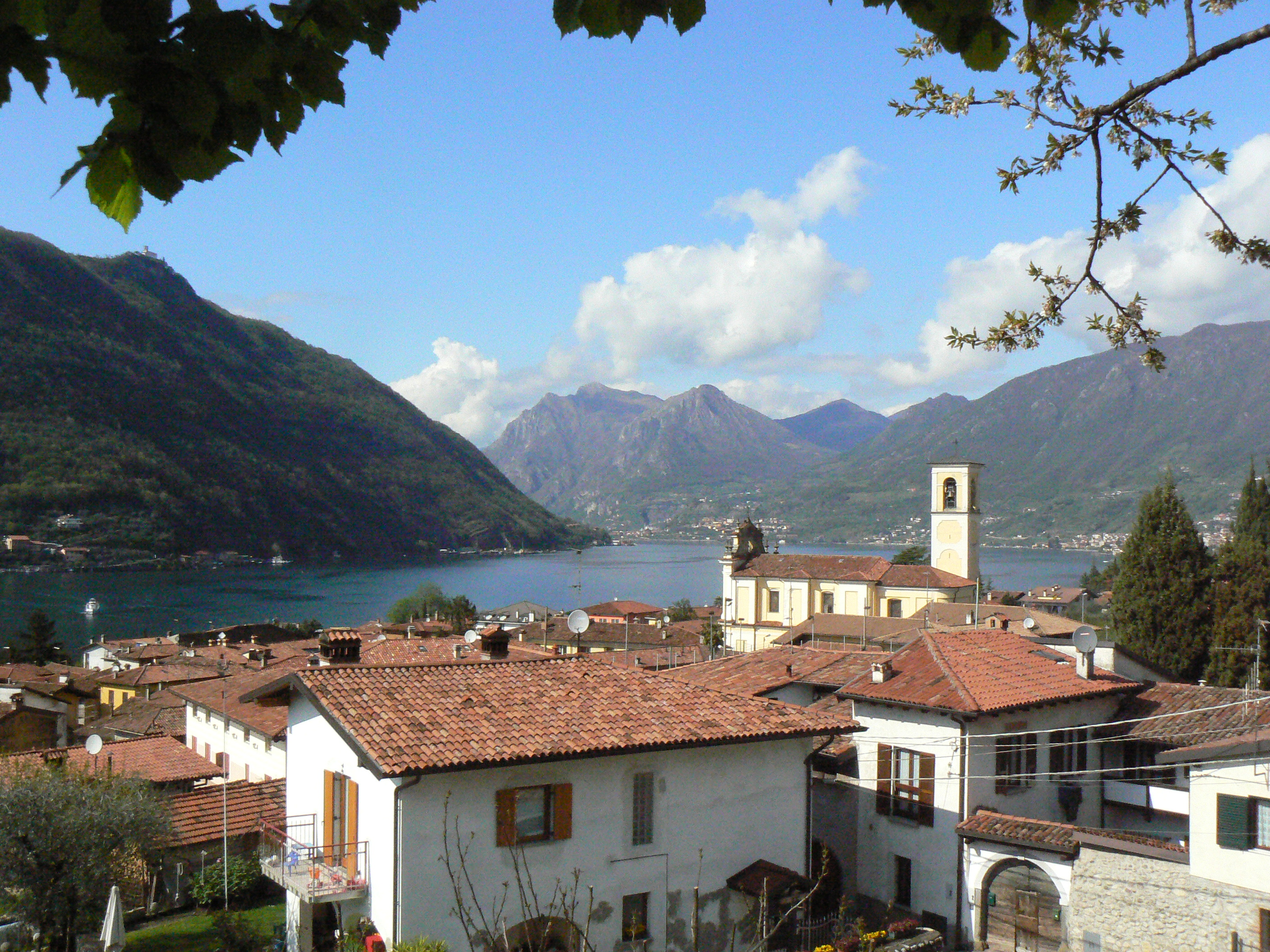 Panoramica di Sulzano e del lago d'Iseo